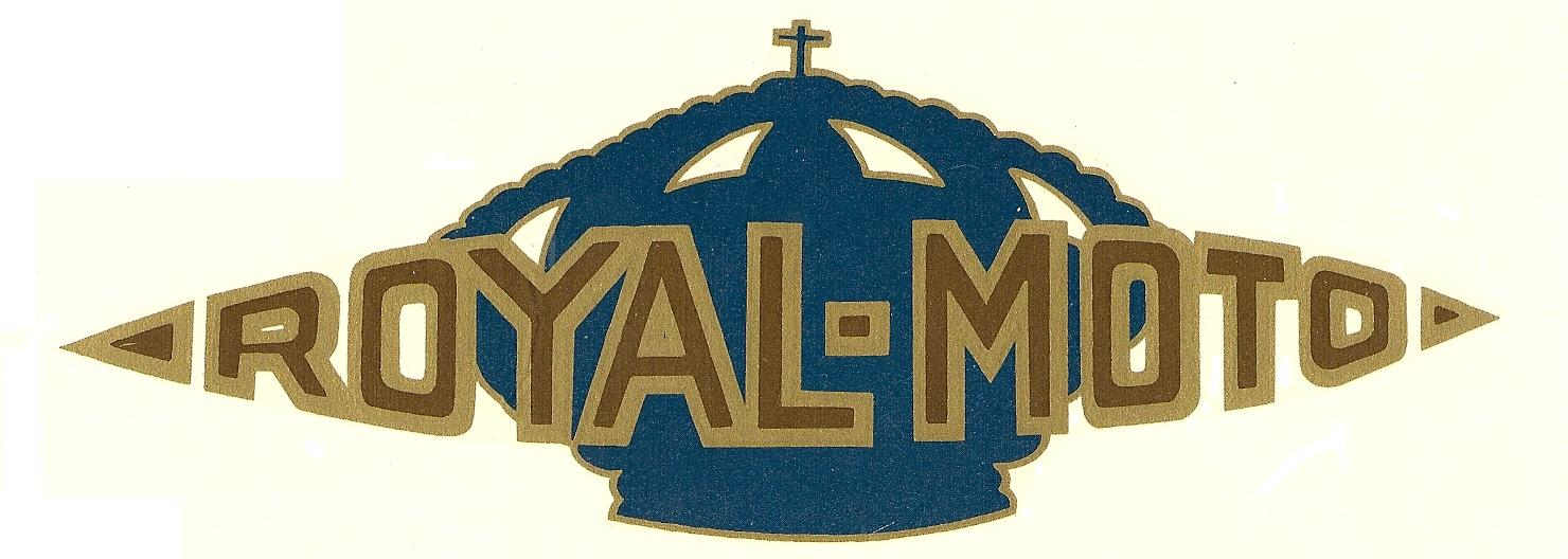 Décalcomanie de réservoir